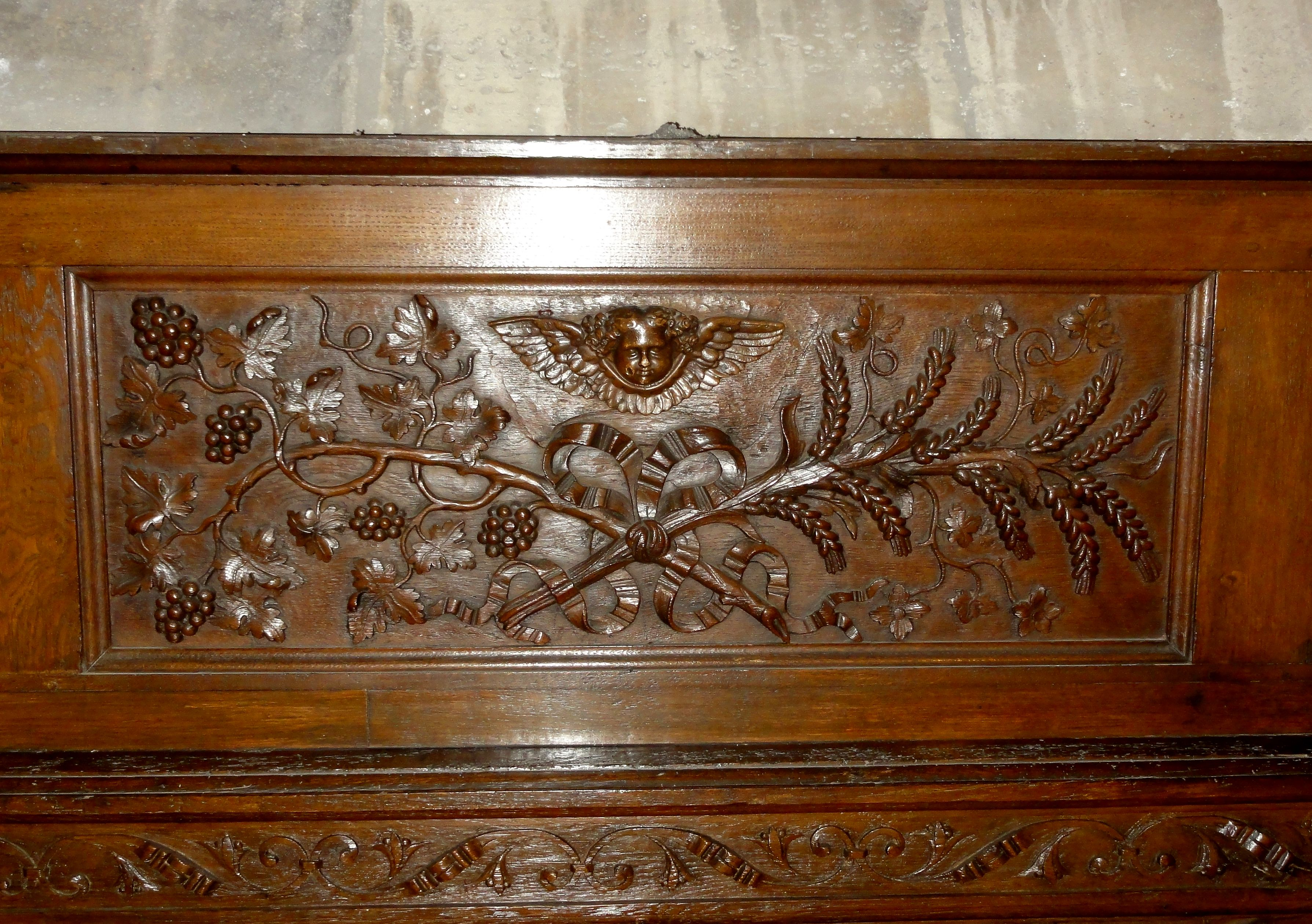 Boiseries de la chapelle des fonts baptismaux.